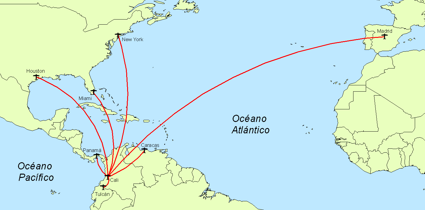 Vuelos internacionales directos desde/hacia Cali